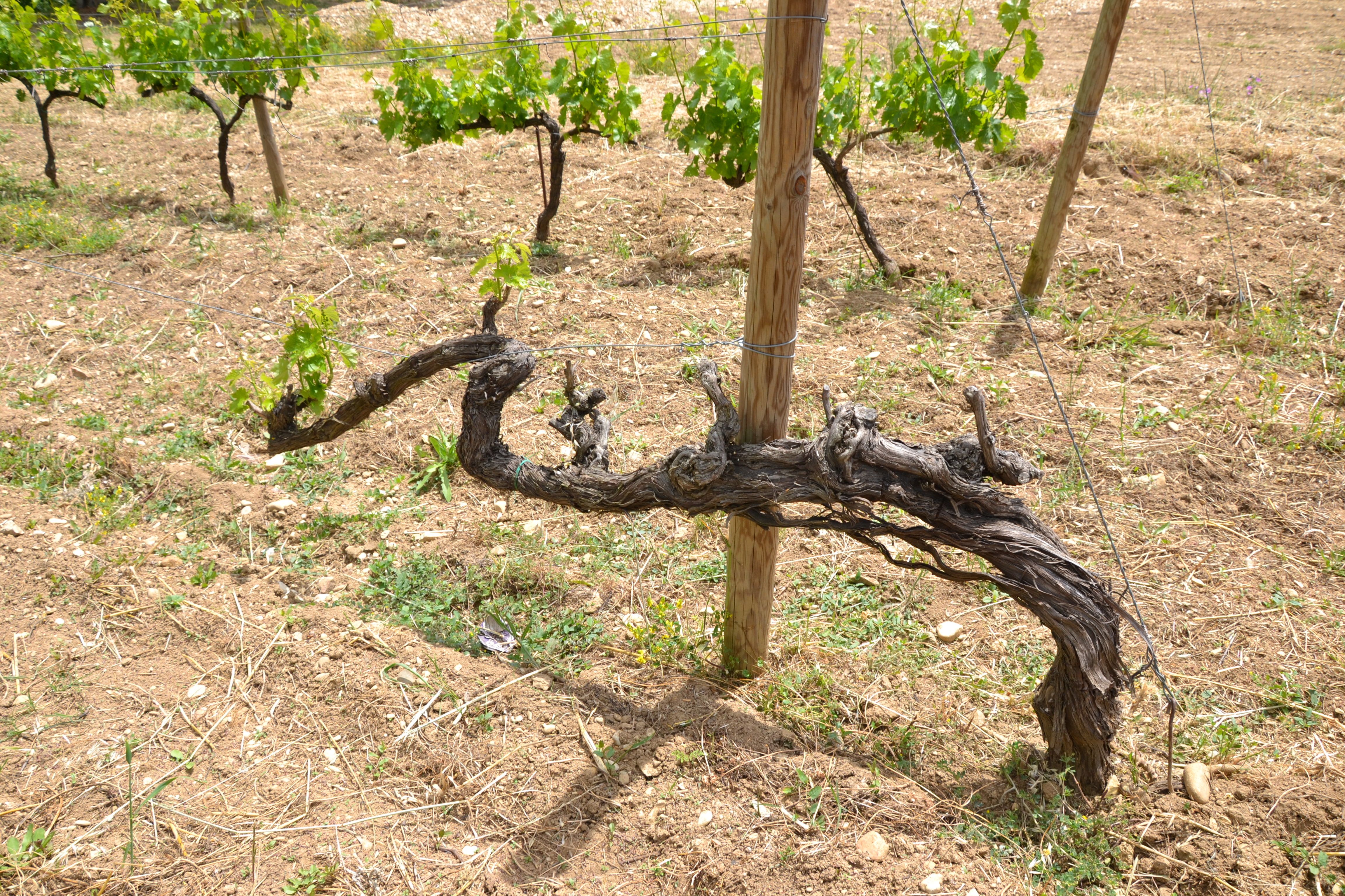 cep de cépage Savatiano